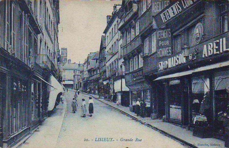 Lisieux, département du Calvados, sur une carte postale de la fin du 19e ou du début du 20e siècle. Vue de la Grande rue (devenue rue Henry-Chéron en 1936). Vu de l'Ouest vers l'Est.